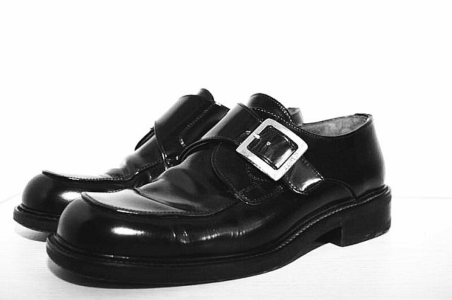 Immagine: scarpa di vernice from germania